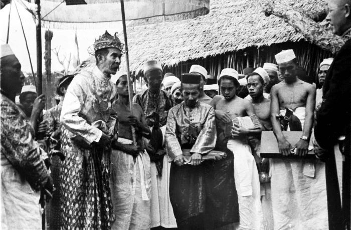 Repronegatief. Mangi Mangi Karaëng Bontonompo, koning van Gowa, luistert met zijn volgelingen en enkele hoogwaardigheidsbekleders, naar de installatierede van waarnemend gouverneur van Celebes en Onderhorigheden, de heer Bosselaar